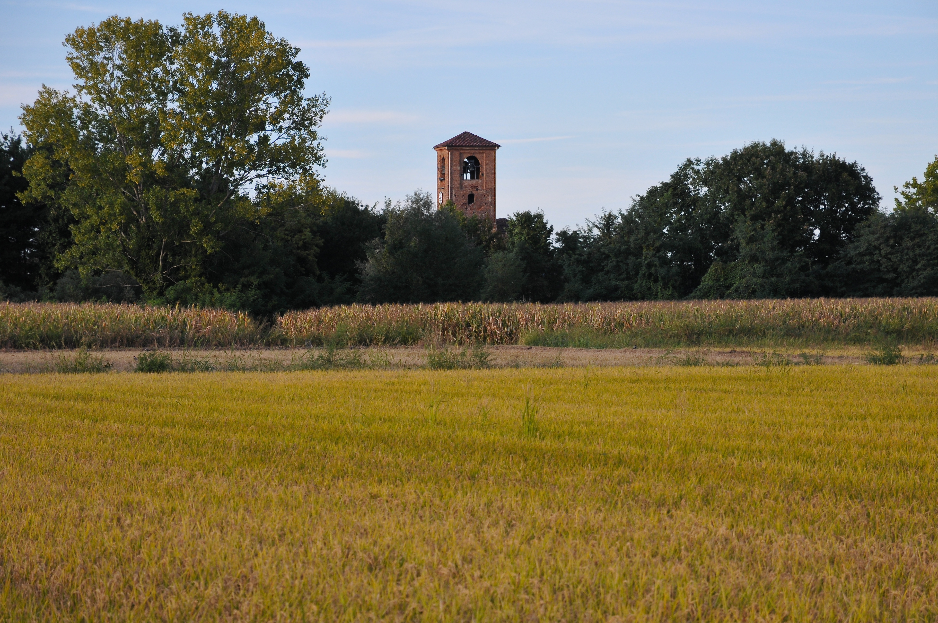 Campagna